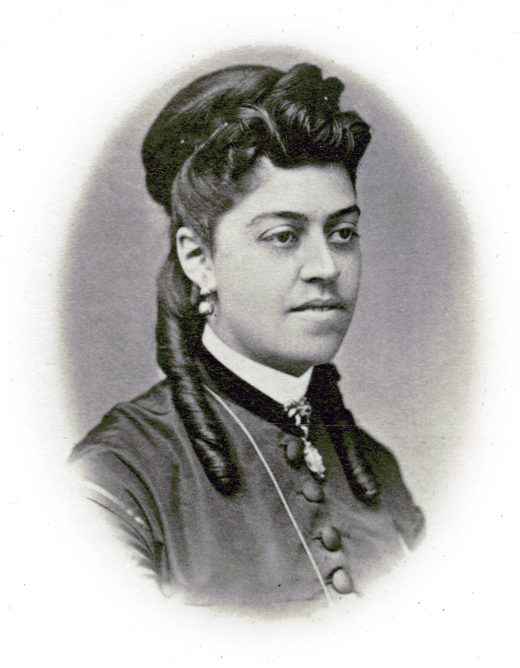 Jeanette Jacobsson, sångare vid Kungliga Operan 1868